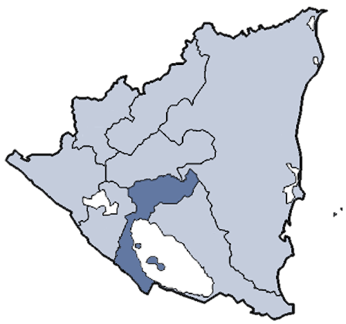 Mappa della diocesi cattolica di Granada, in Nicaragua. Lavoro personale eseguito a partire da questa immagine di Commons. Fonte per i confini delle diocesi: Categoria:Chiesa cattolica in Nicaragua